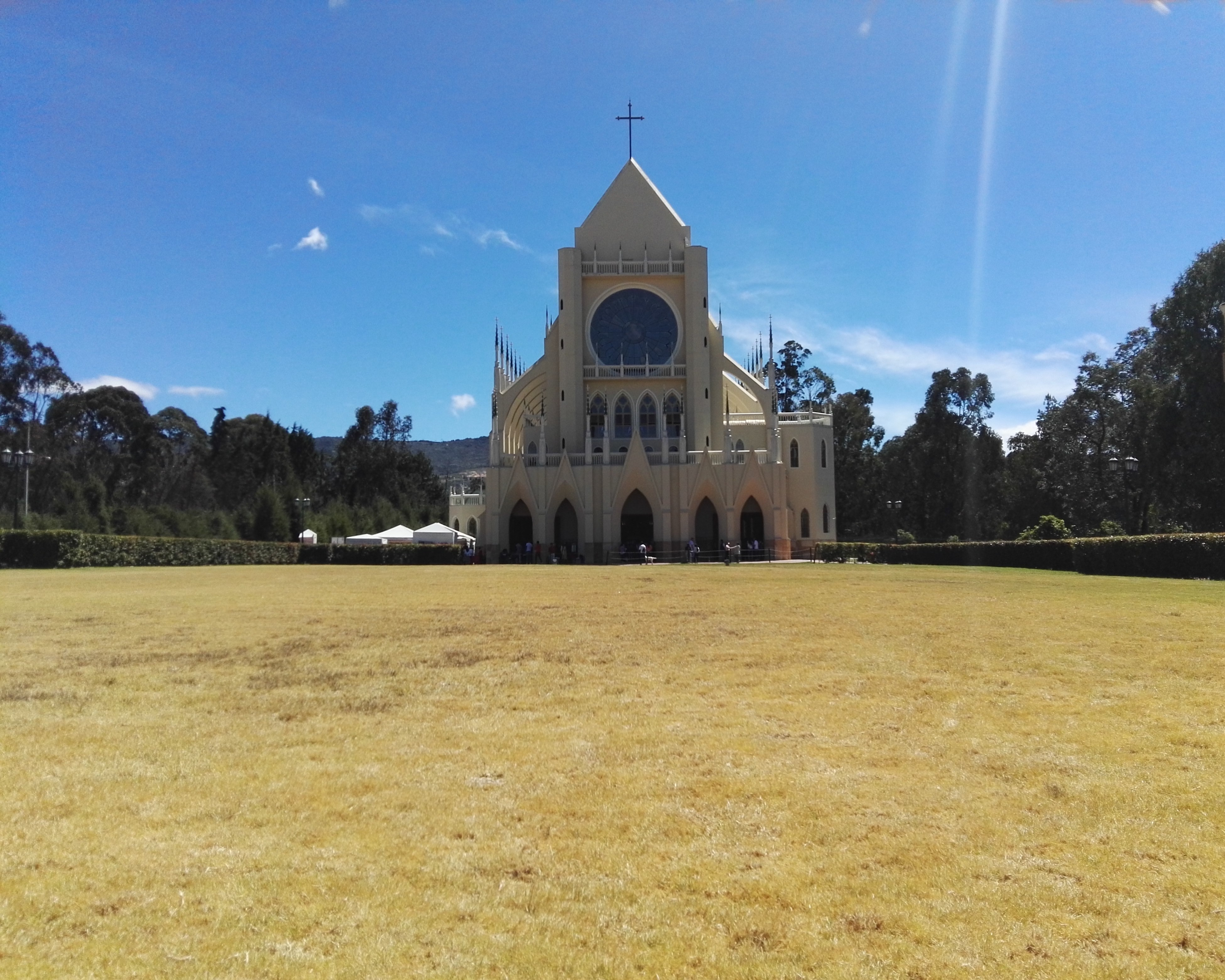 Iglesia construida recientemente y se encuentra en el municipio de Tocancipá via Zipaquirá. Esta fotografía fue tomada en el municipio colombiano con código 25817.